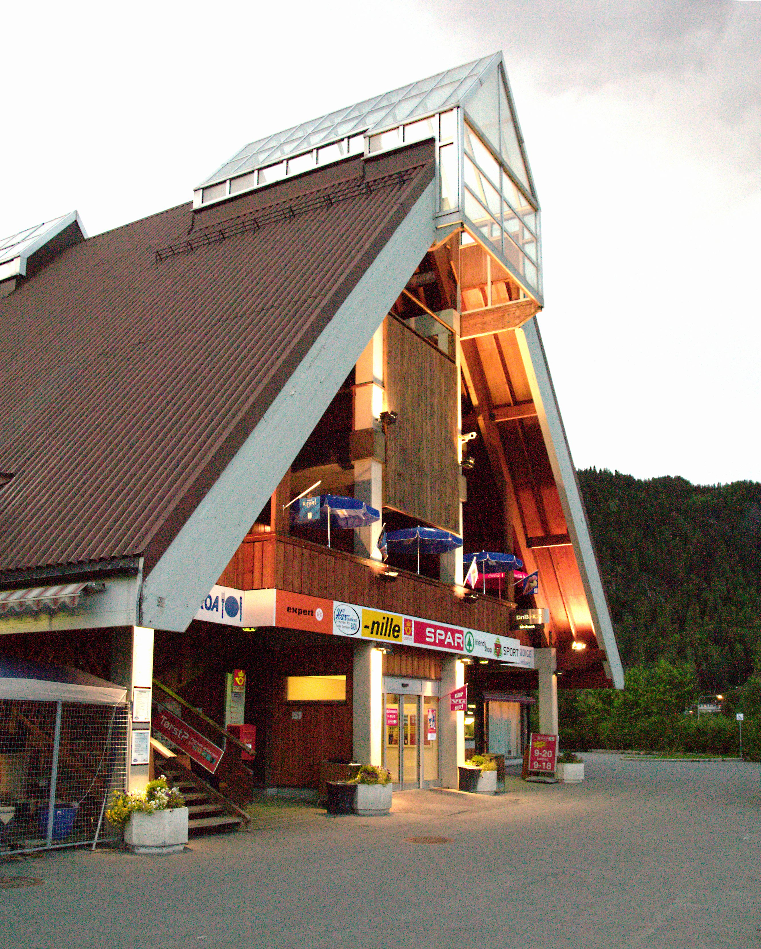 Front og Valdrestunet kjøpesenter (shopping mall) at Bagn